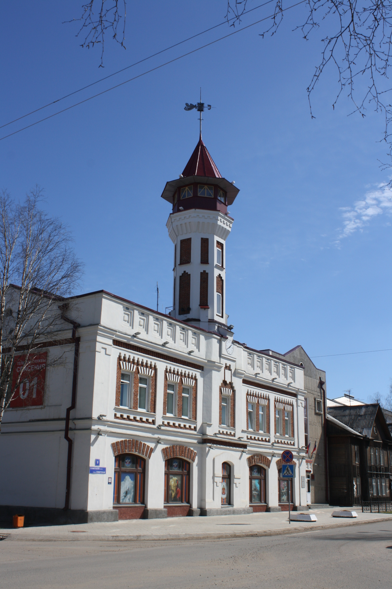 Syktyvkar, Komi Republic, Russia